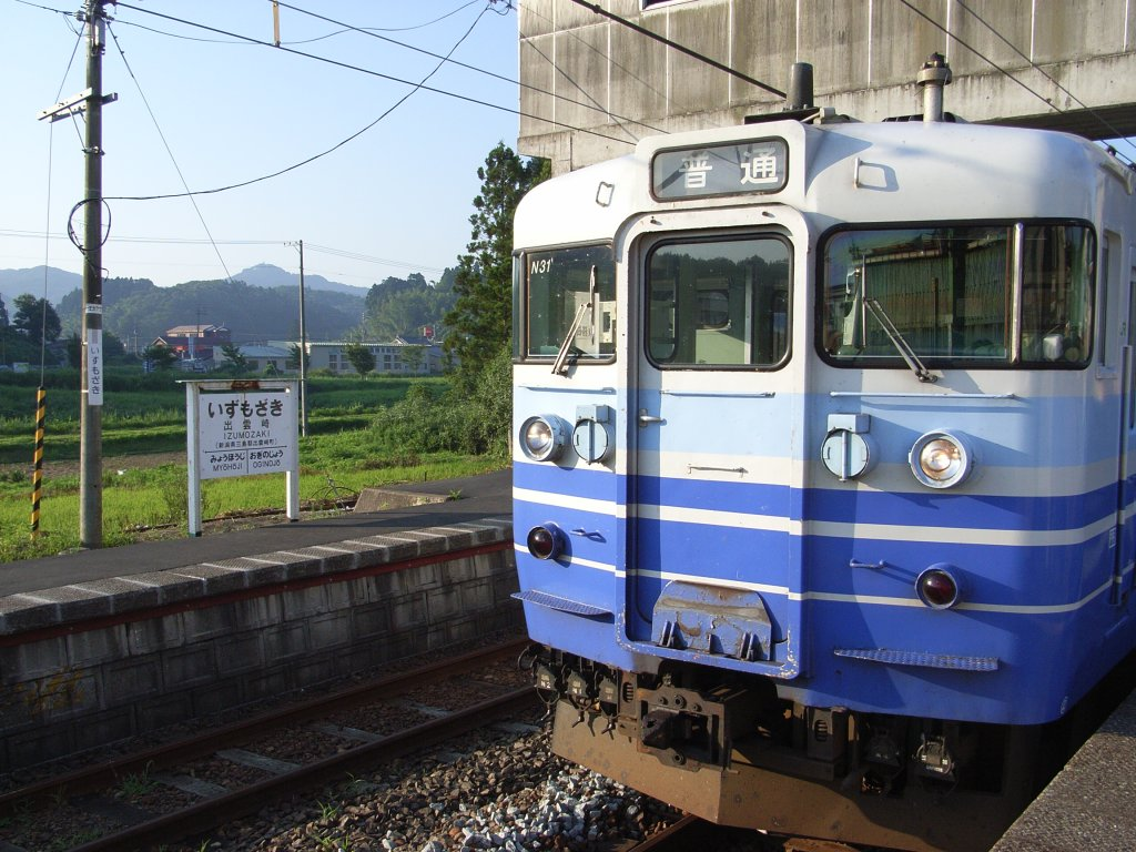 JR越後線出雲崎駅